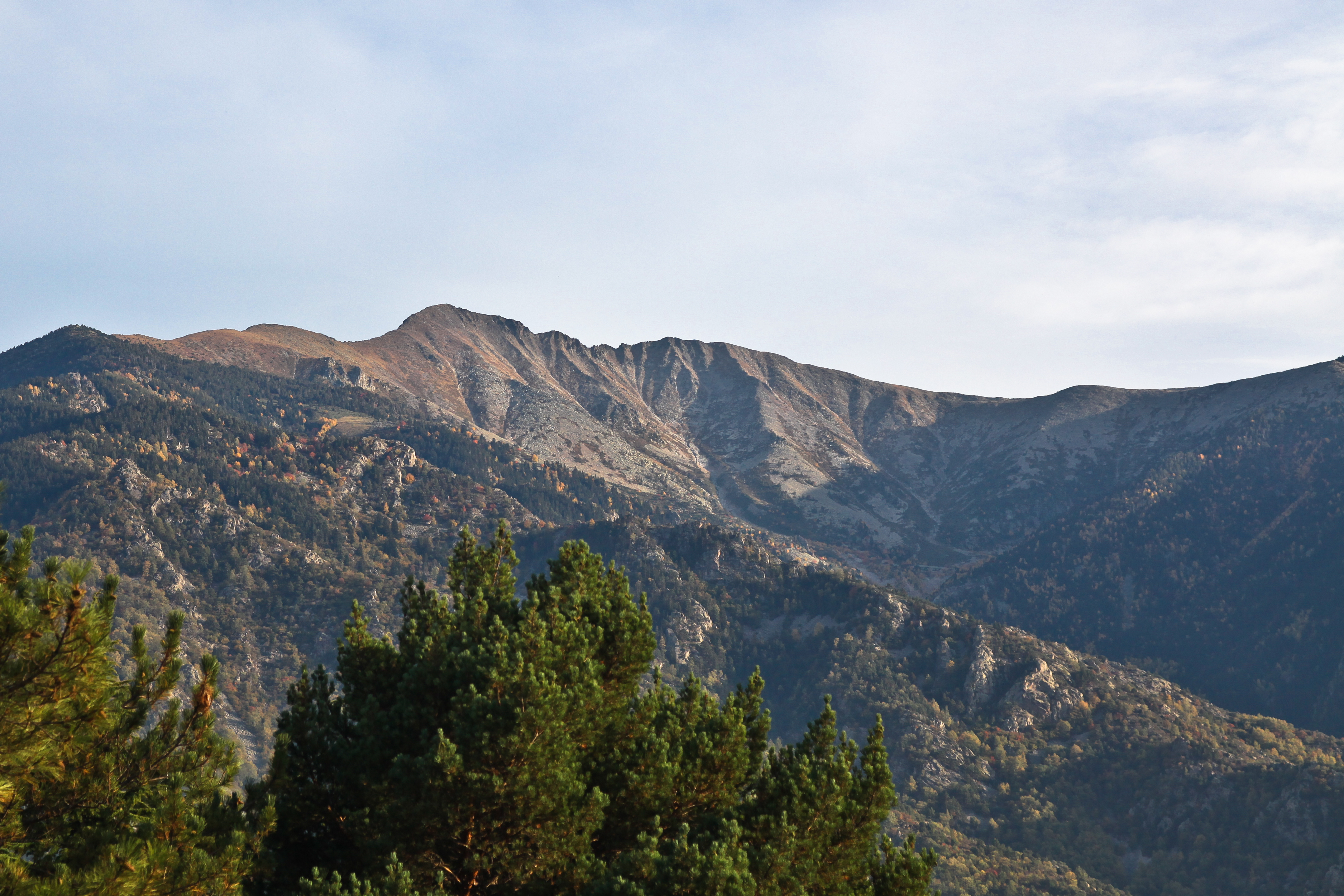 Soir d'octobre autour de Vernet-les-Bains, massif du Canigou face Nord-Ouest, PNR des Pyrénées Catalanes